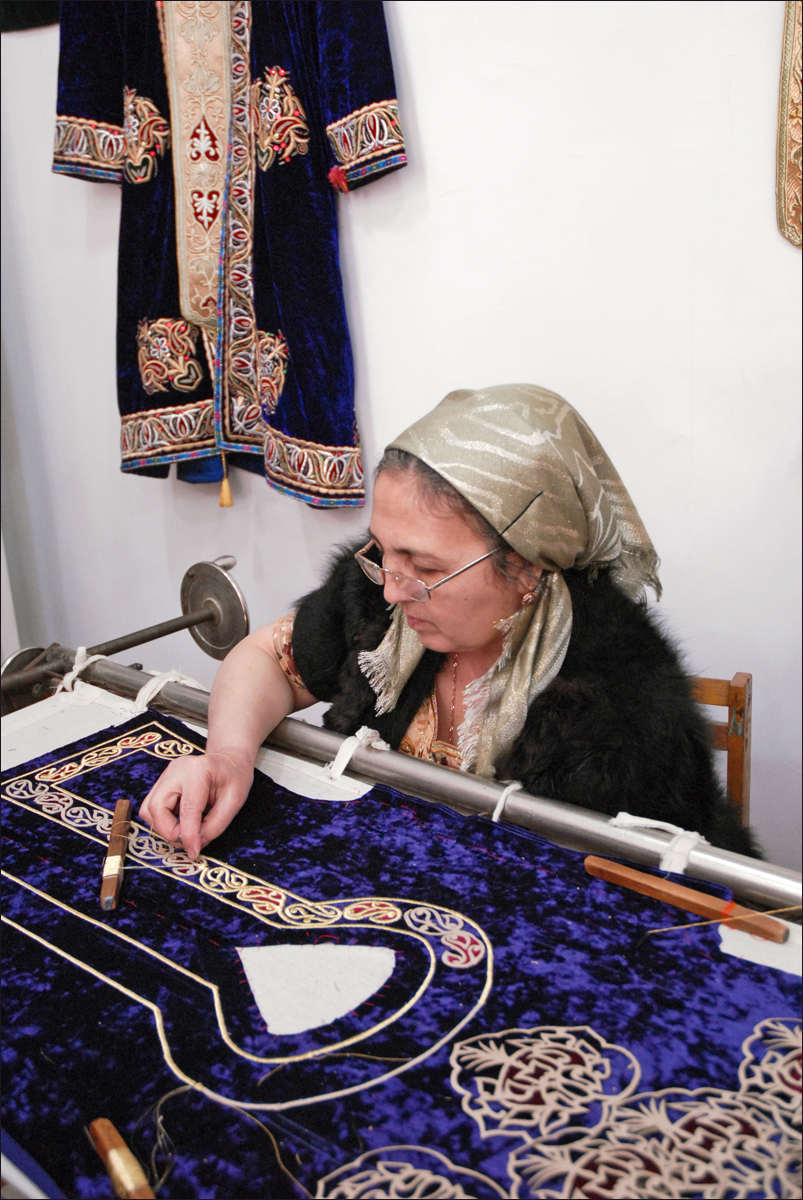 La broderie d'or a atteint son apogée à Boukhara au 19ème siècle. Les brodeurs d'or travaillaient essentiellement pour l'Emir et son entourage. Depuis l'Indépendance, cet art de la broderie par exemple sur manteau (Chapan) pour homme ou femme, comme le montre la photo, est à nouveau pratiqué.